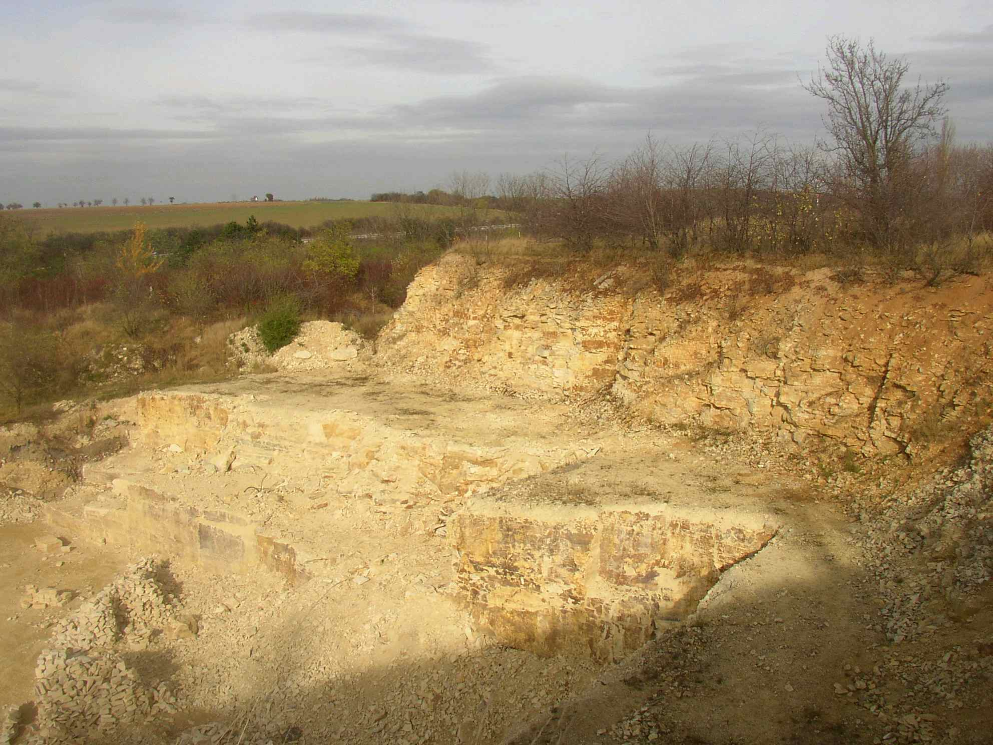 Přírodní památka Opukový lom u Přední Kopaniny v Praze. Pohled od jihu na činnou část lomu.